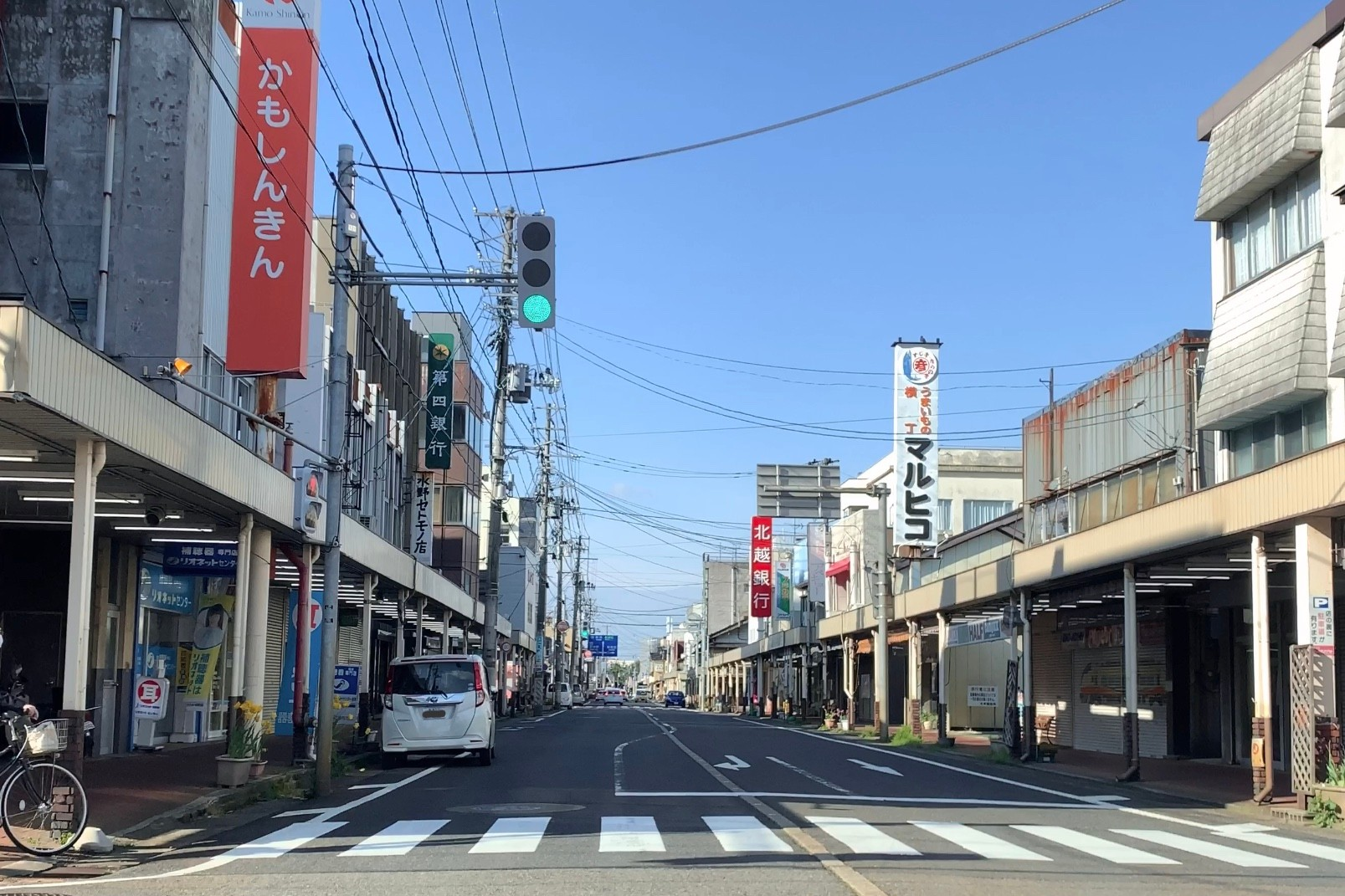 新津本町 新光商店街（2020年4月）